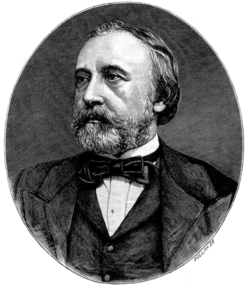 Margó Tivadar (1816–1896) orvos, honvédorvos, zoológus, a Magyar Tudományos Akadémia tagja. Pollák Zsigmond metszete